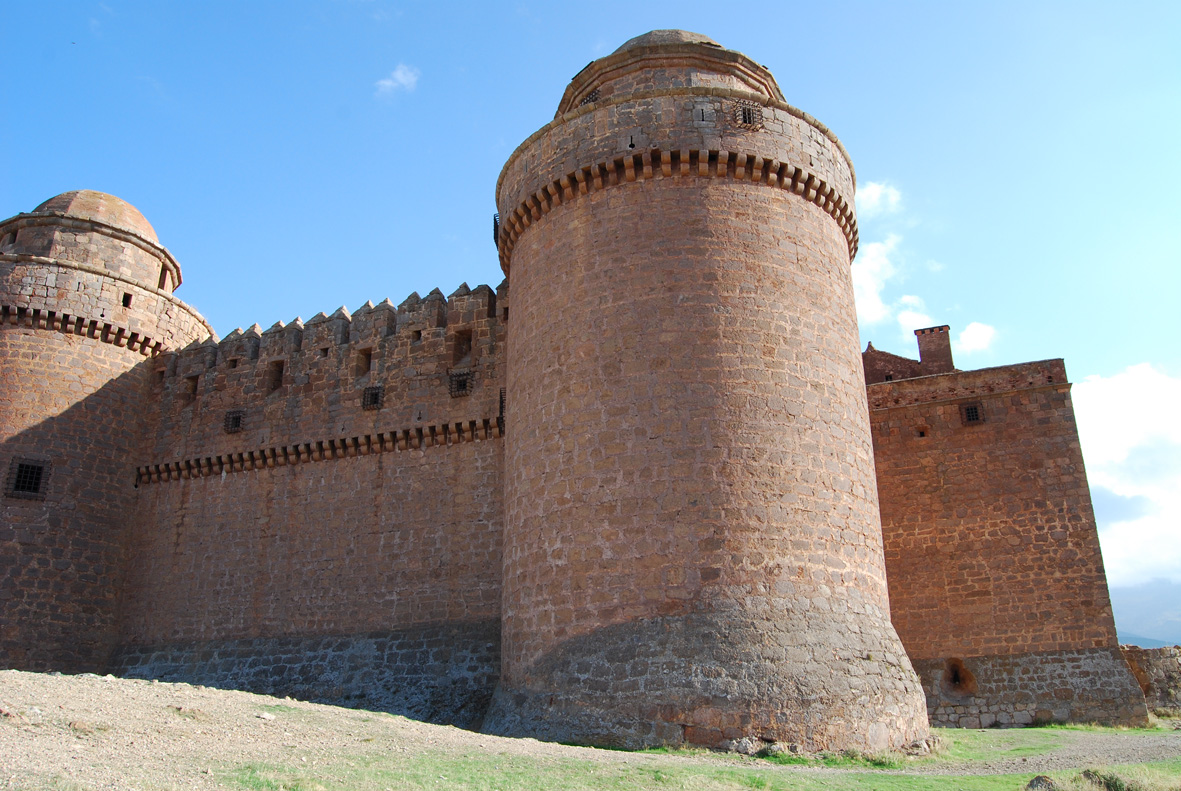 Castillo de La Calahorra.